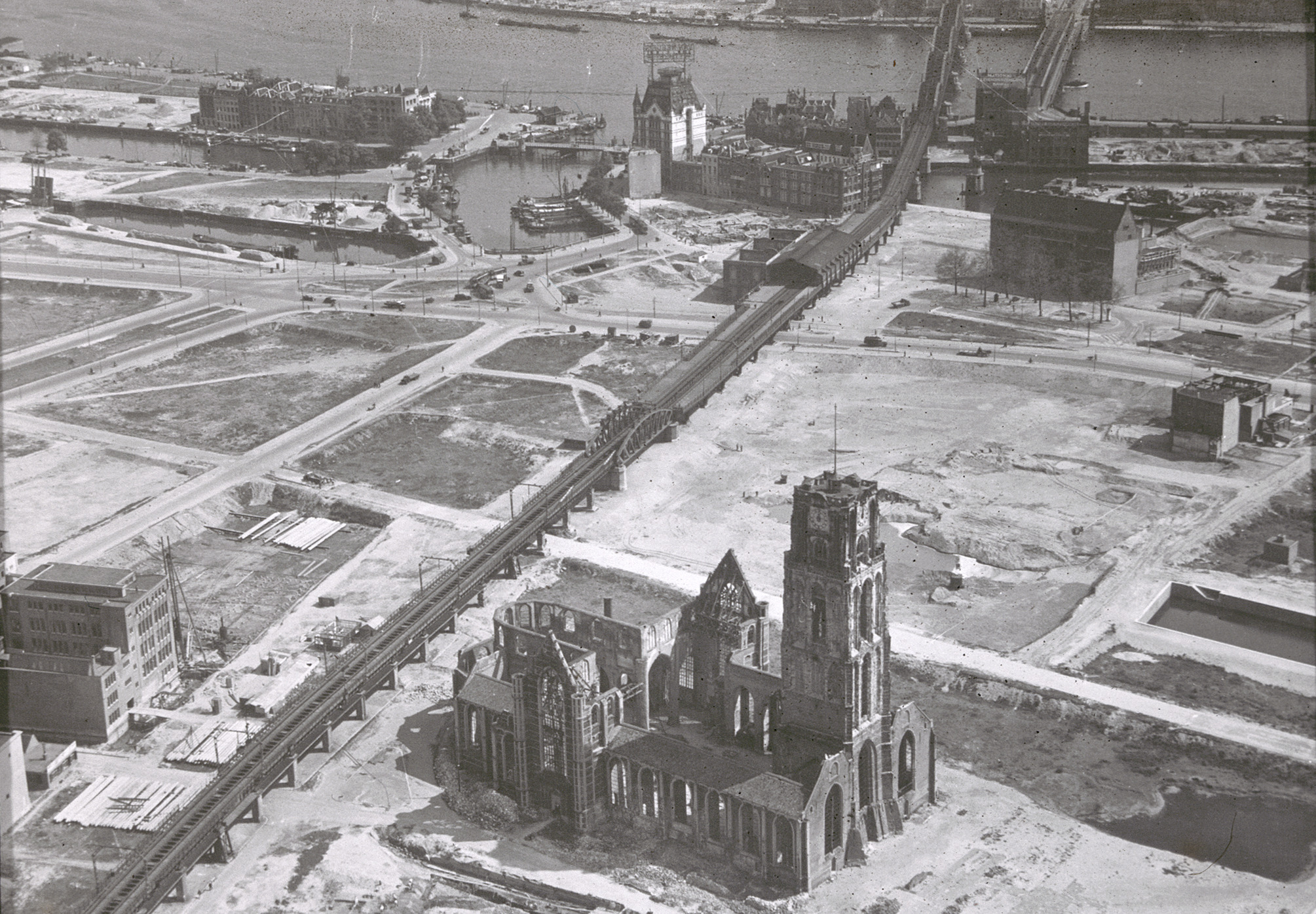 NEDERLANDS HERVORMDE KERK (GROTE- OF SINT LAURENSKERK): Exterieur OVERZICHT NA BOMBARDEMENT (OORLOGSSCHADE)